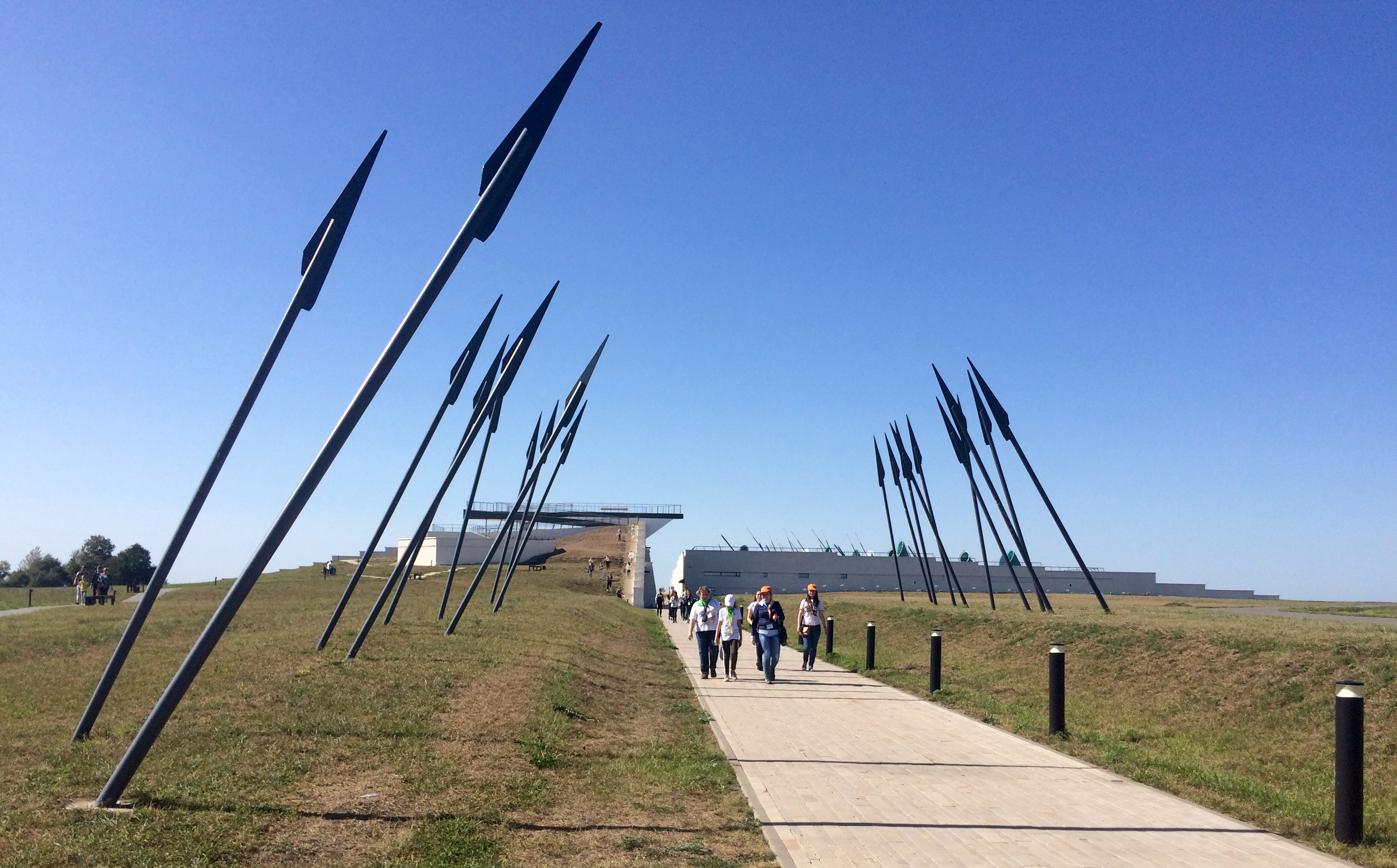 Куликово поле - место, где в 1380 г. было сражение войск Дмитрия Донского и Мамая (Куликово поле и памятники на нем): территория, Куркинский район, Тульская область